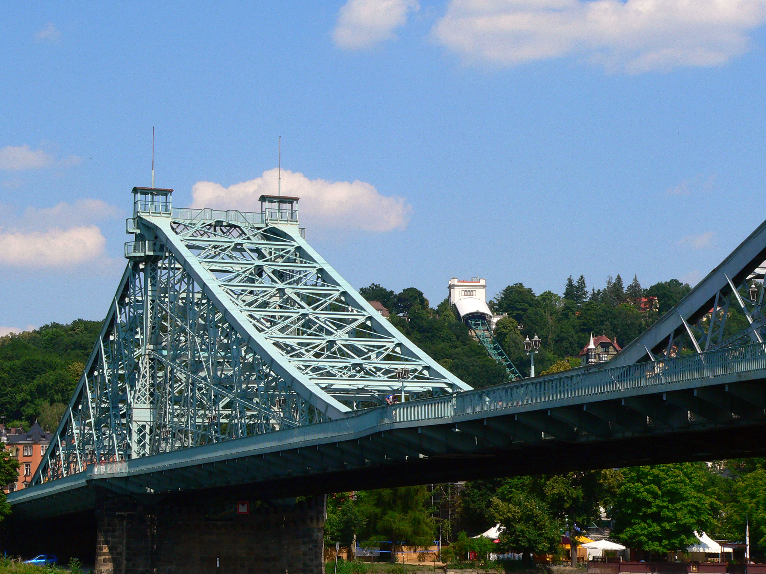 Blaues-Wunder02 Dresden